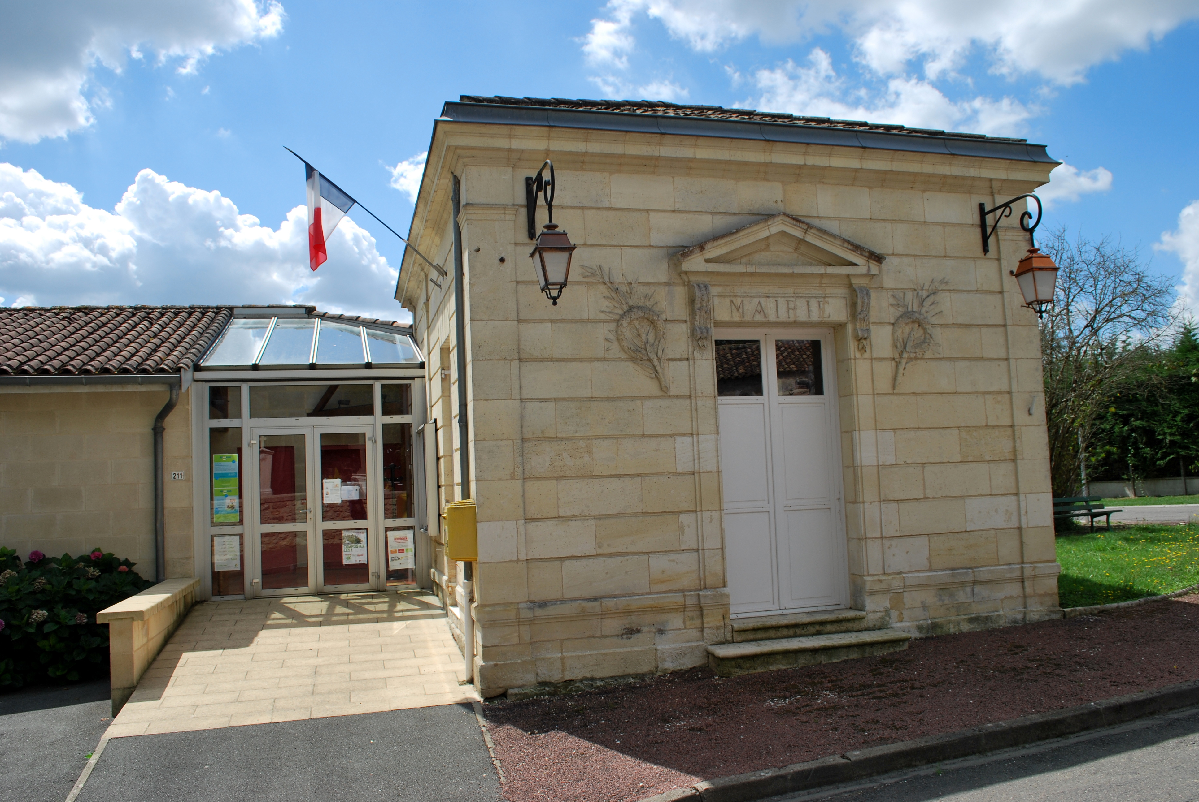 Tarnès